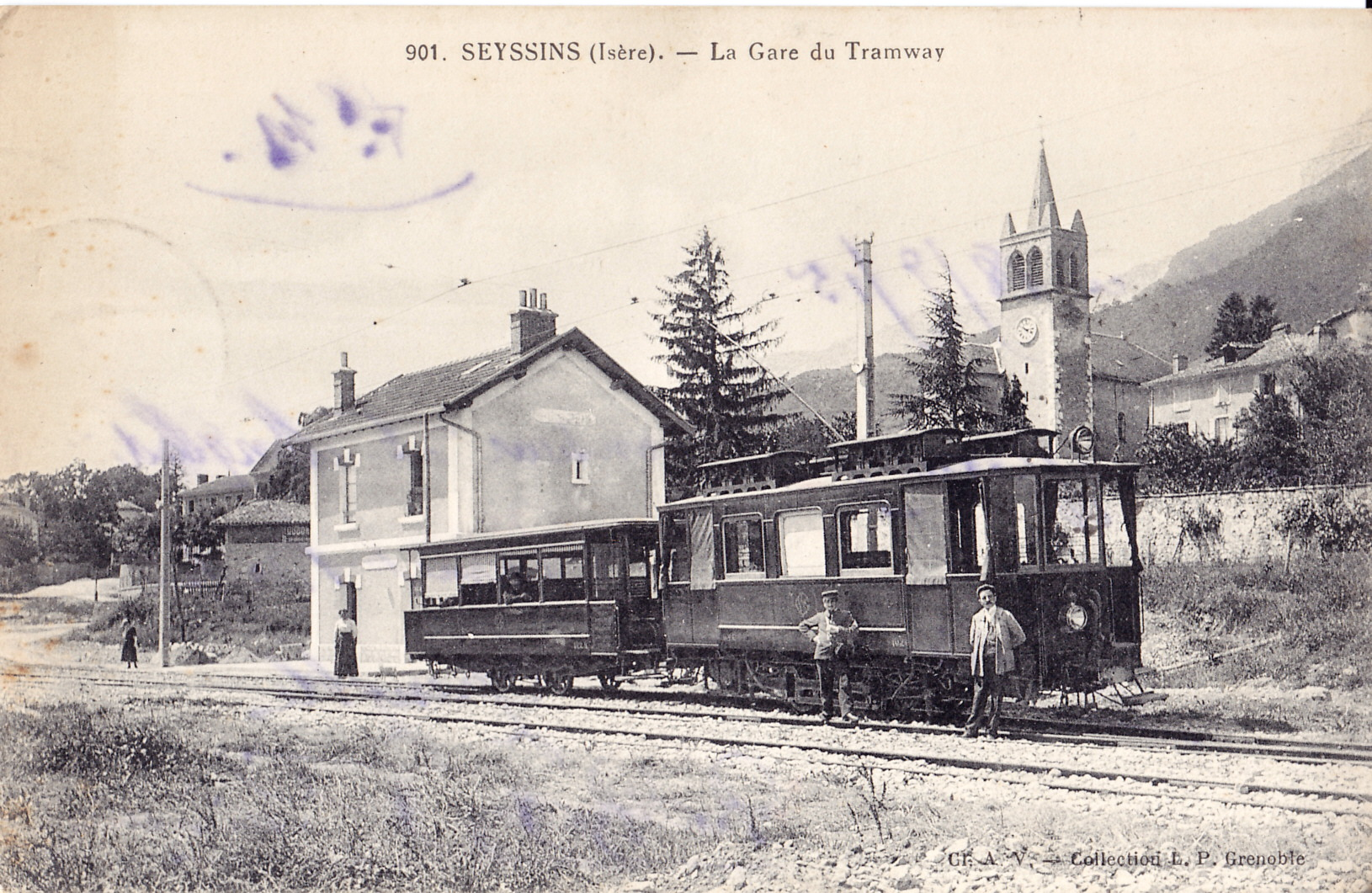 Carte postale ancienne éditée par LP, n°901 (Cliché A. V.) :SEYSSINS - La Gare du Tramway